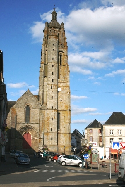 Français